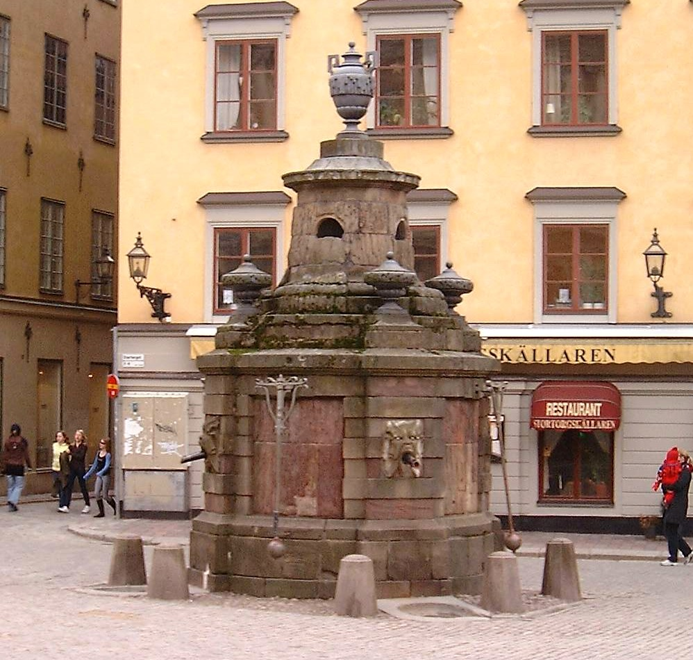 Fountains at Stortorget in Gamla stan, Stockholm.